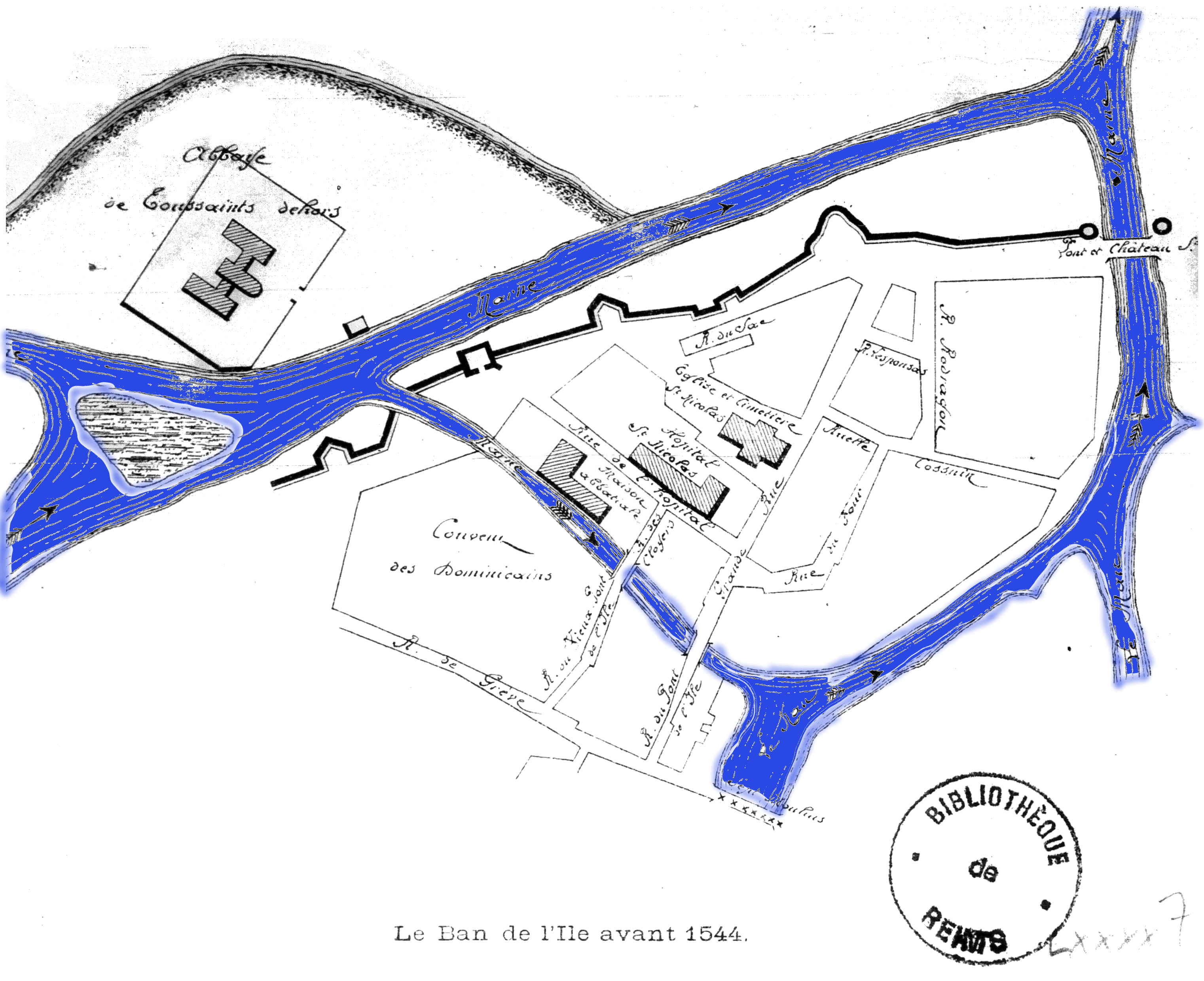 vue de l'abbaye en 1544.